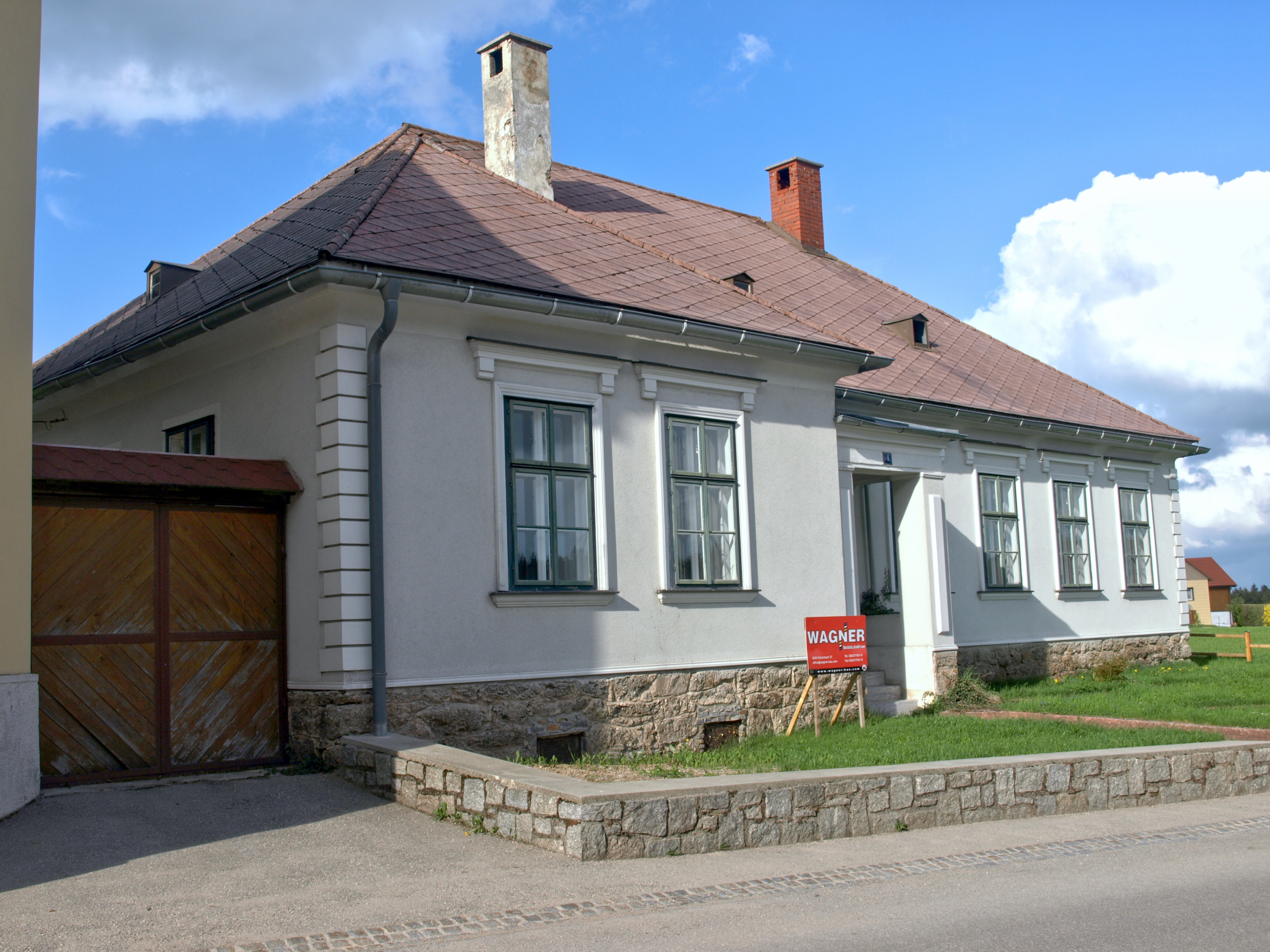 Pfarrhof